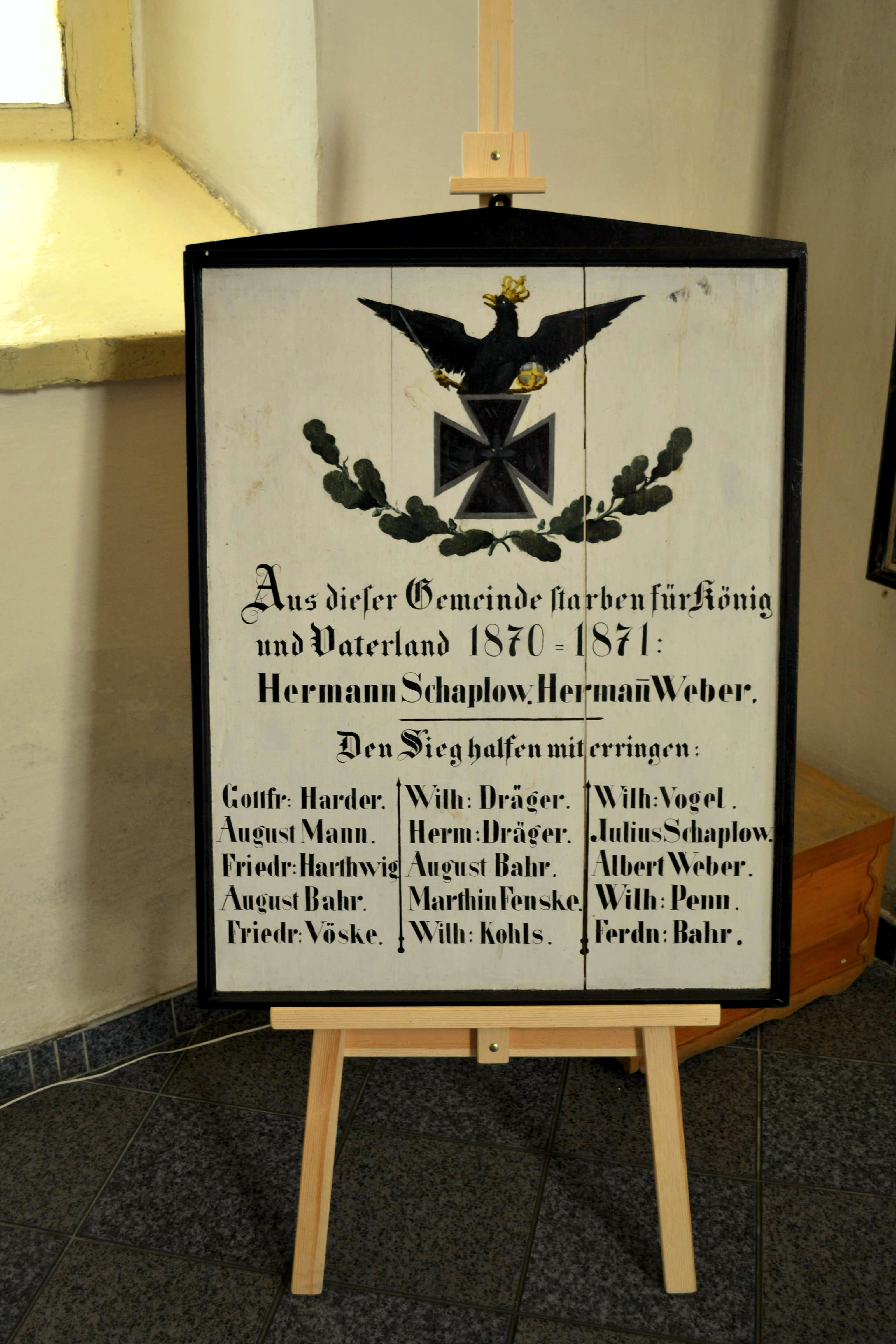 Kościół w Drawnie